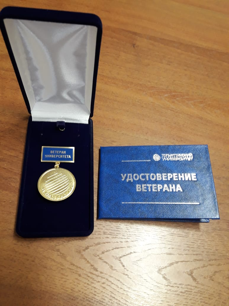 Звание "Ветеран Тольяттинского государственного университета" присваивается сотрудникам университета имеющим не менее 20 лет непрерывного трудового стажа